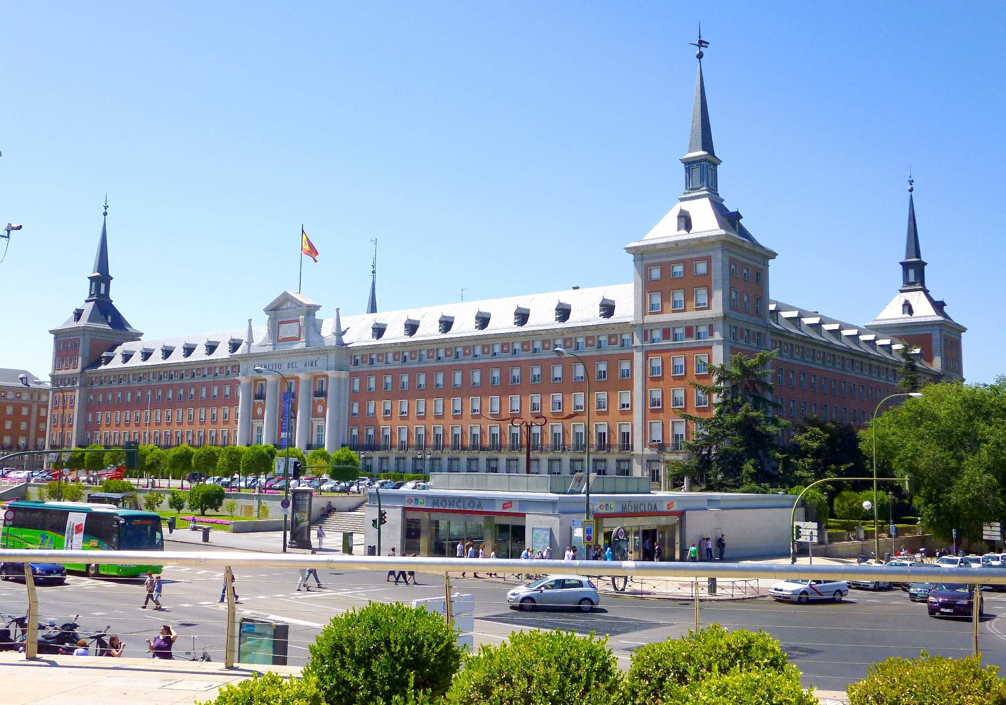 Cuartel General del Ejército del Aire de España, en Madrid